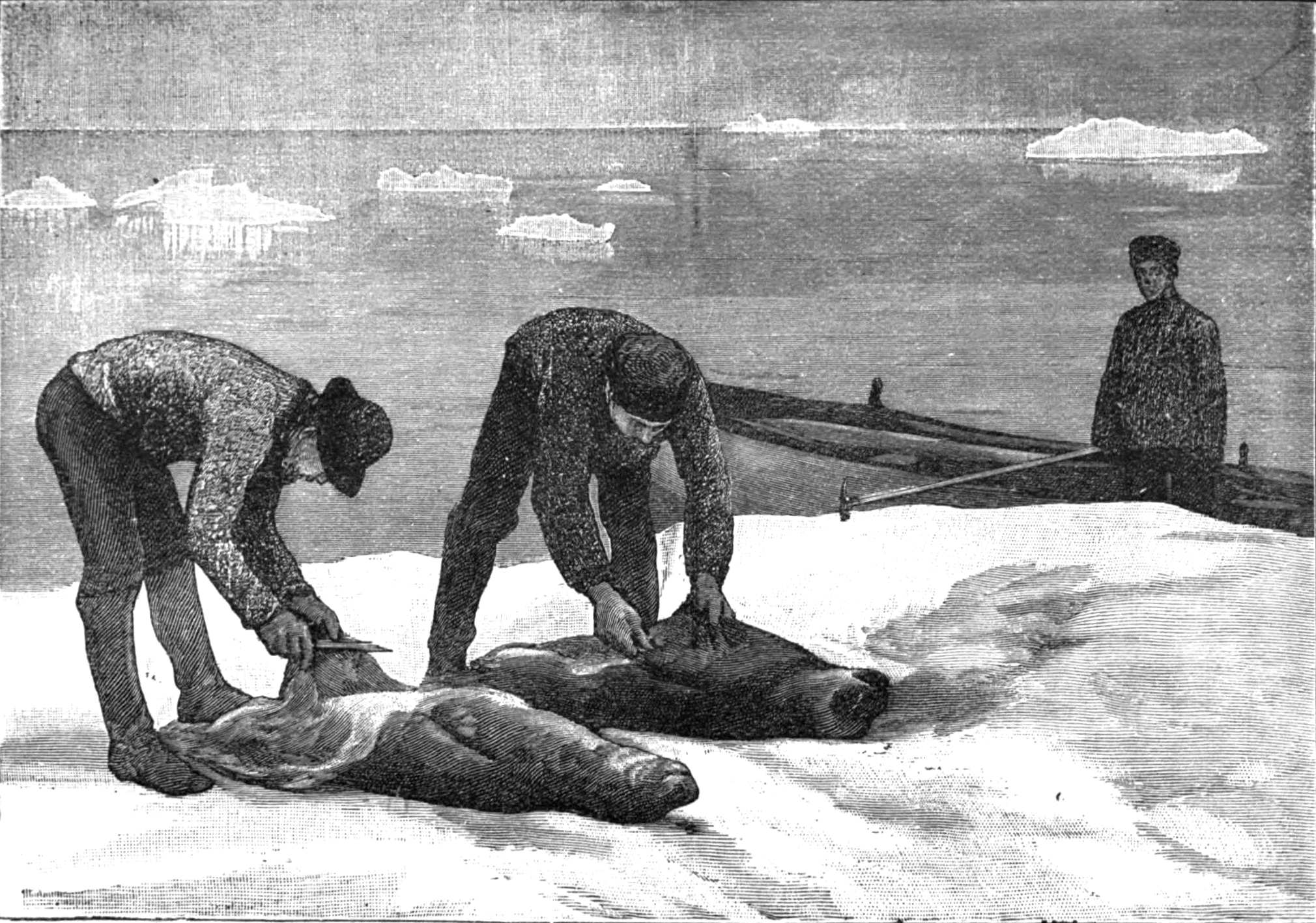 Участники гренландской экспедиции Нансена разделывают добытых на охоте тюленей.